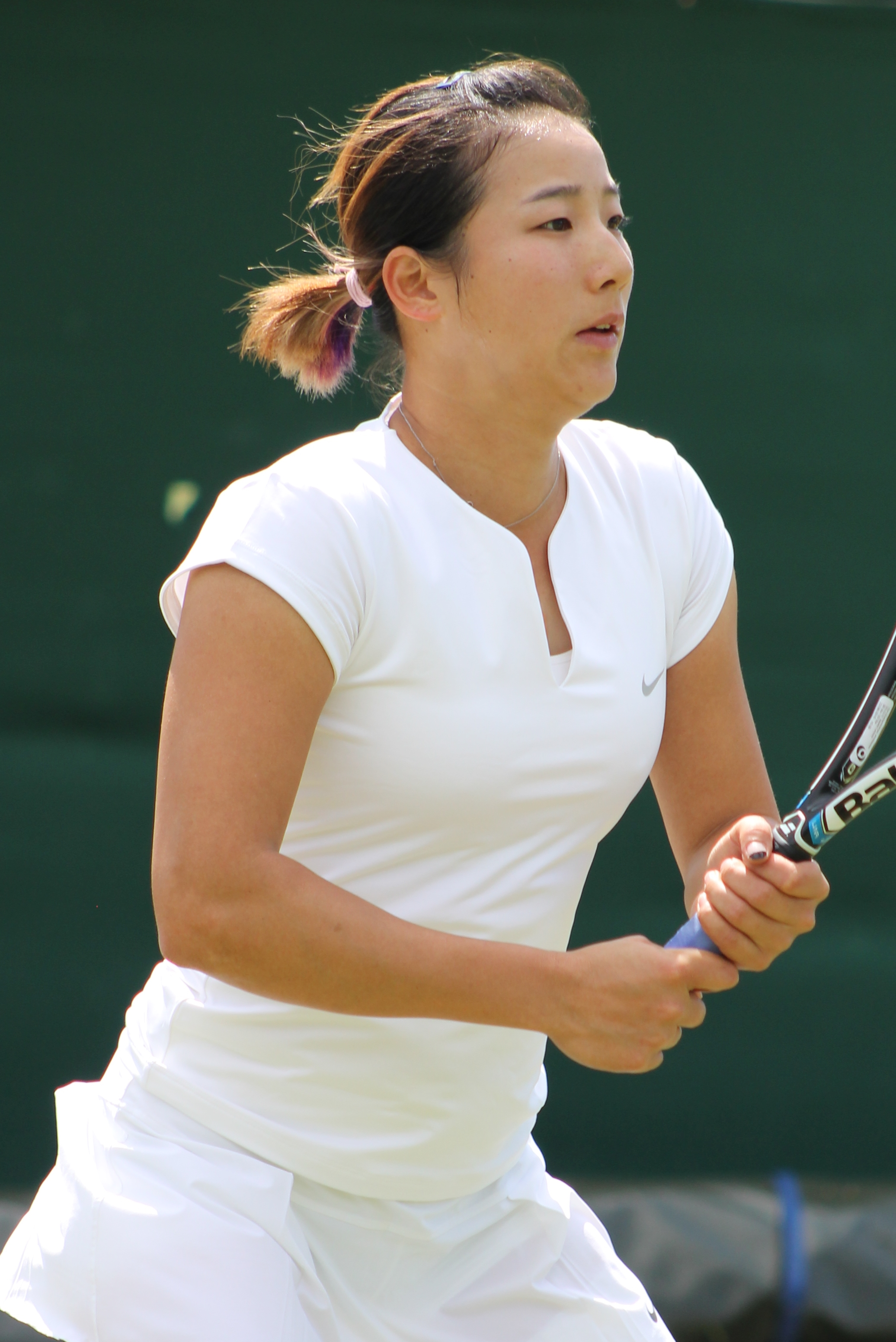 Zhang K.L. WMQ15 (1)